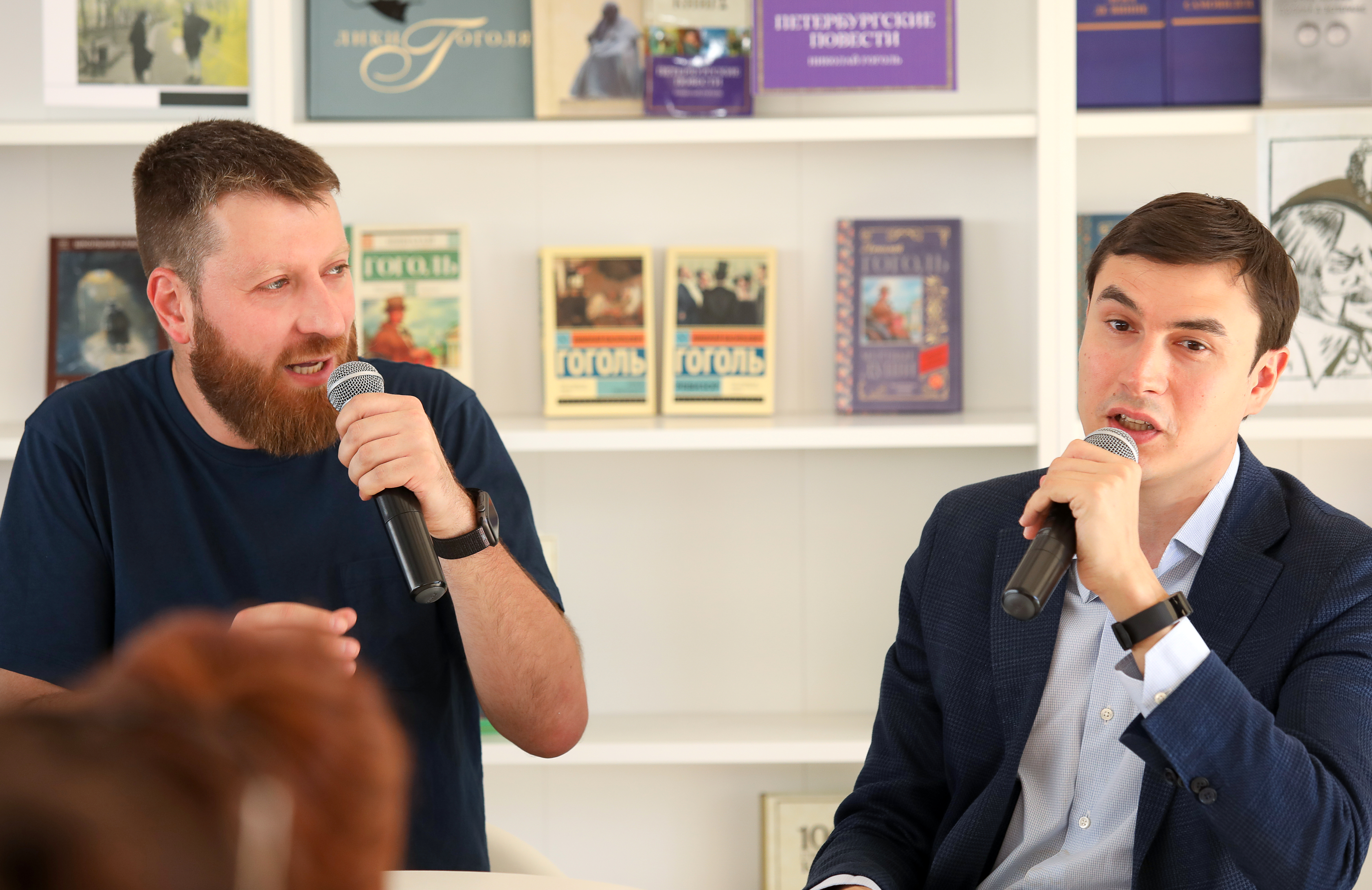 Константин Мильчин (главный редактор проекта «Горький») и Сергей Шаргунов (справа) на книжном фестивале «Красная площадь».